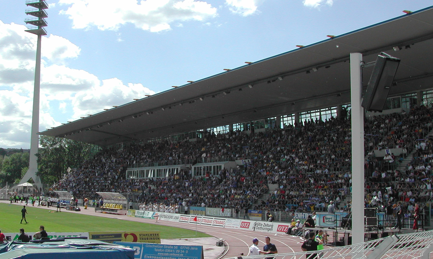 Haupttribüne des Ernst-Abbe-Sportfelds. Aufstiegsspiel des FC Carl Zeiss Jena gegen den MSV Neuruppin um den Aufstieg in die Regionalliga Nord.